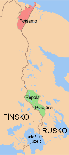 Fínsko-ruská hranica po Zmluve z Tartu.